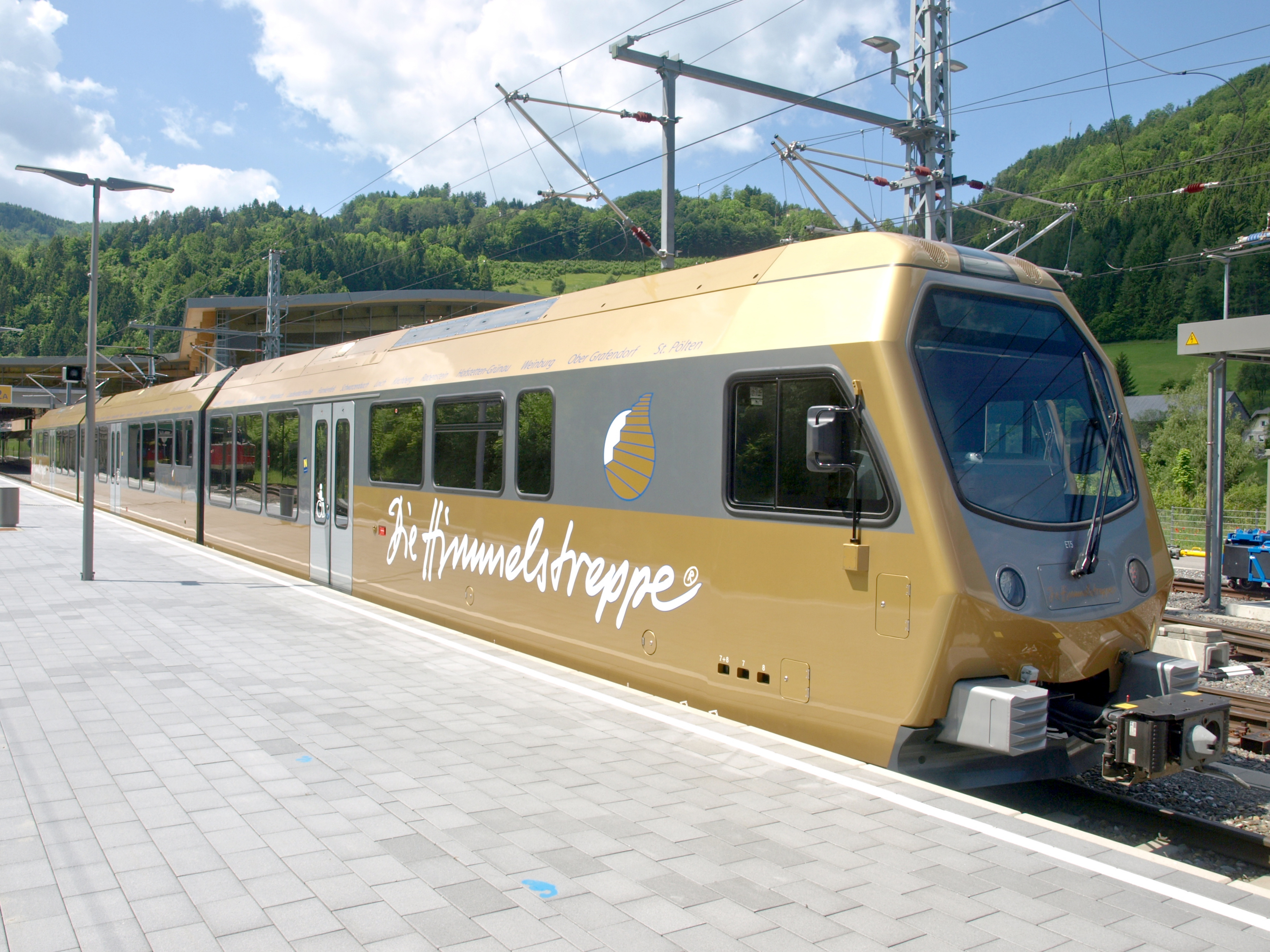 NÖVOG ET1 Himmelstreppe im Bahnhof Laubenbachmühle